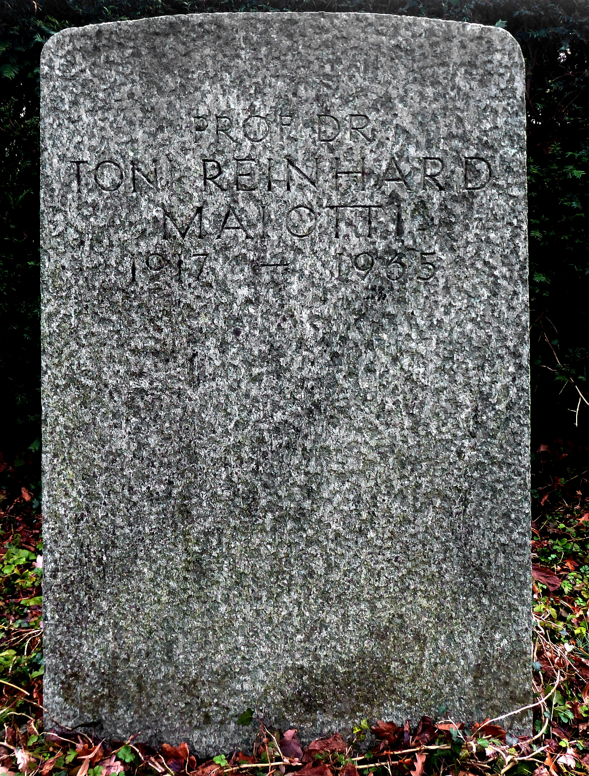 Toni Reinhard-Maiotti (1917–1965) Professor, Romanist, Spanisch-und Italienischlektor Grab auf dem Friedhof Hörnli, Riehen, Basel